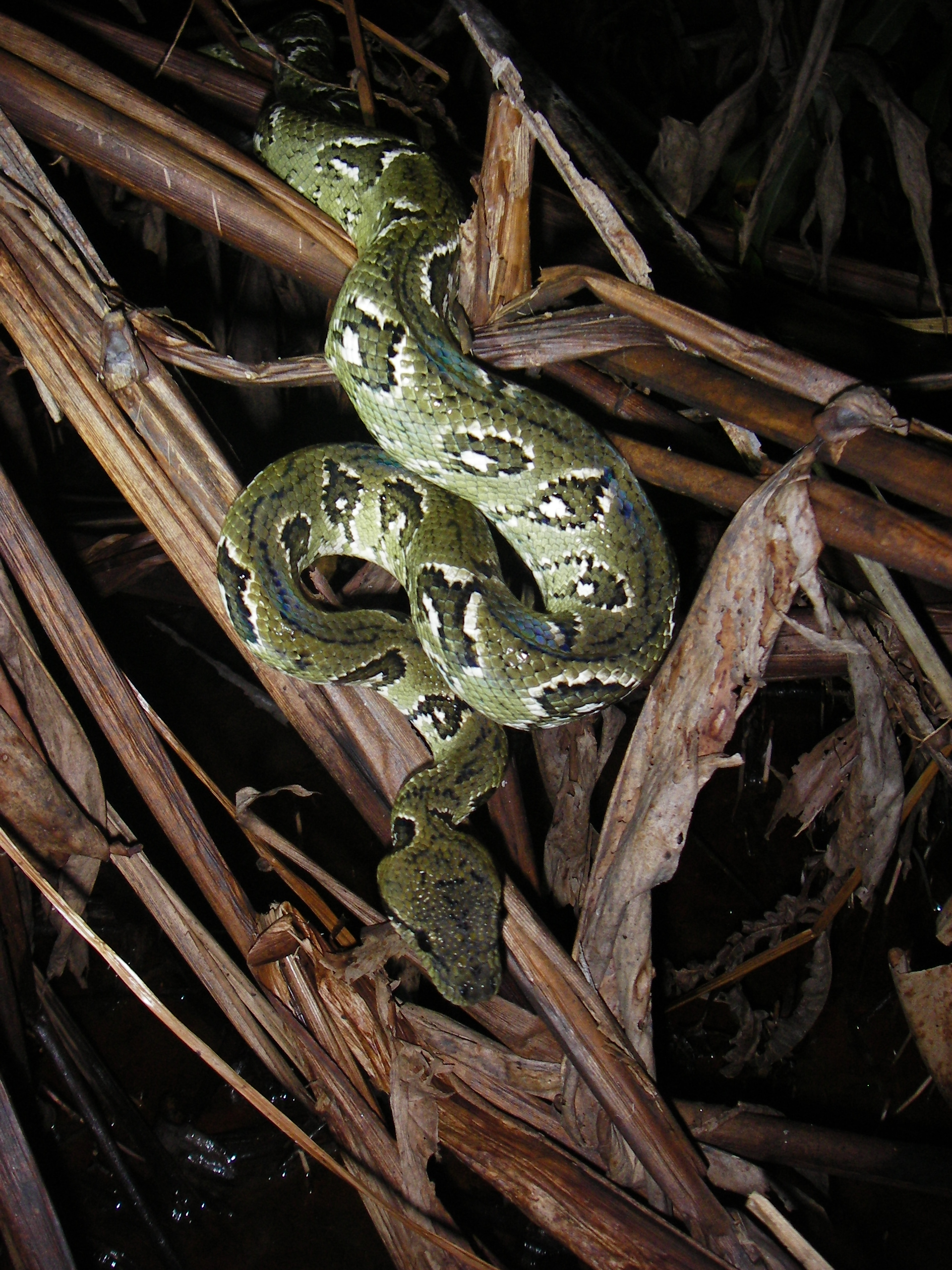 Sanzinia madagascariensis, Ifanadiana, Madagascar